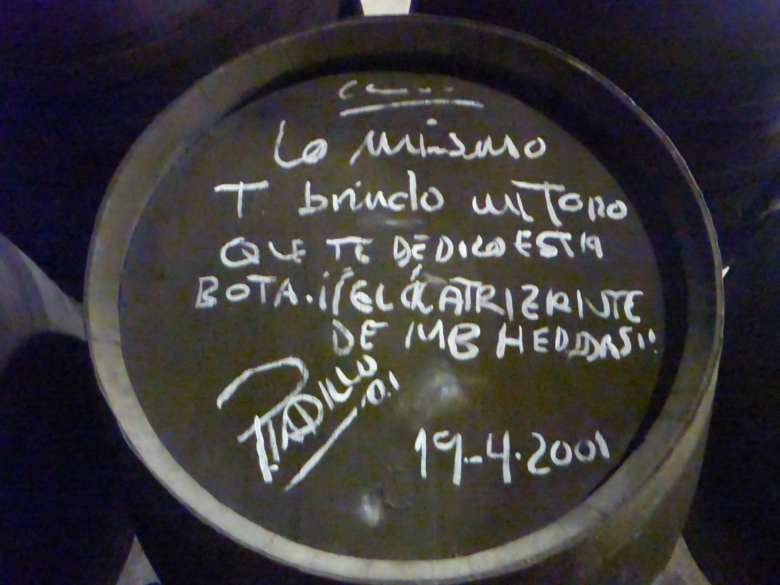 Bodegas Real Tesoro en Jerez de la Frontera